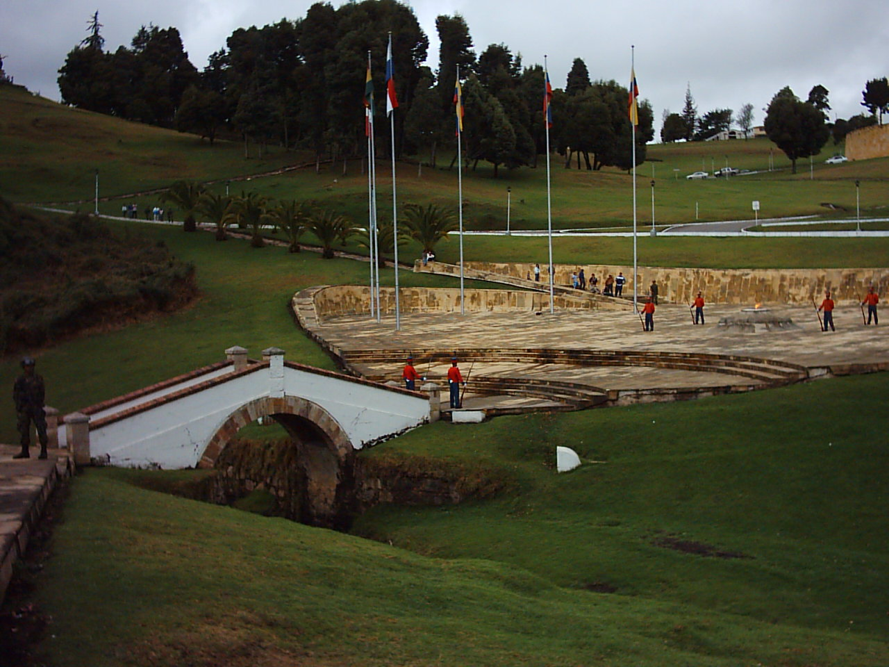 Puente de Boyacá, Colombia